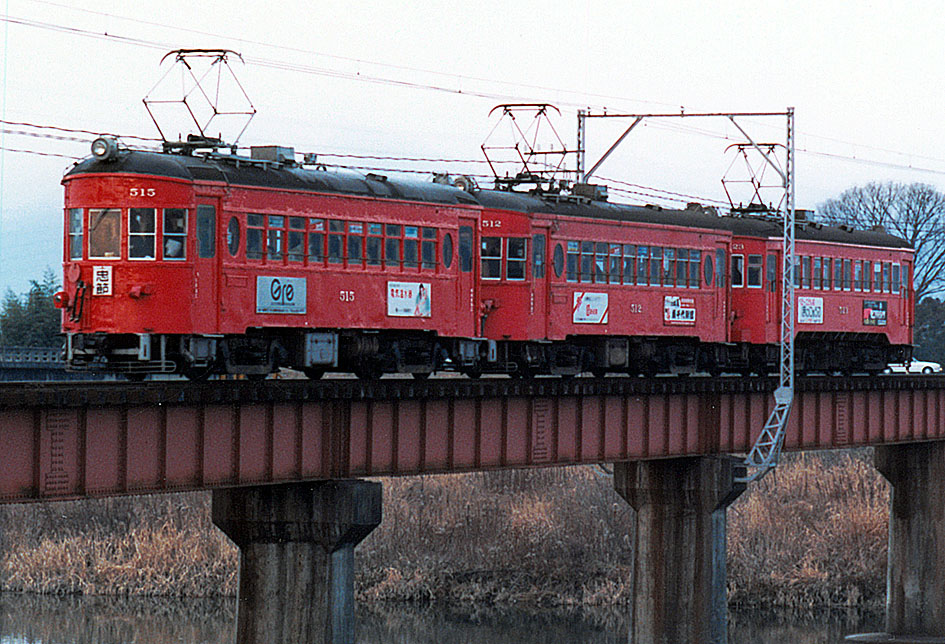 名古屋鉄道 揖斐線 515+512+523